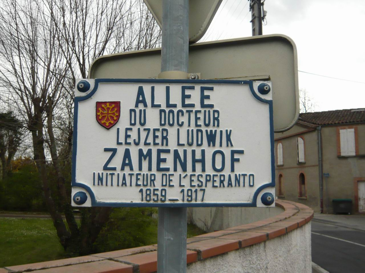 La strato Zamenhof en Tuluzo, Francio.